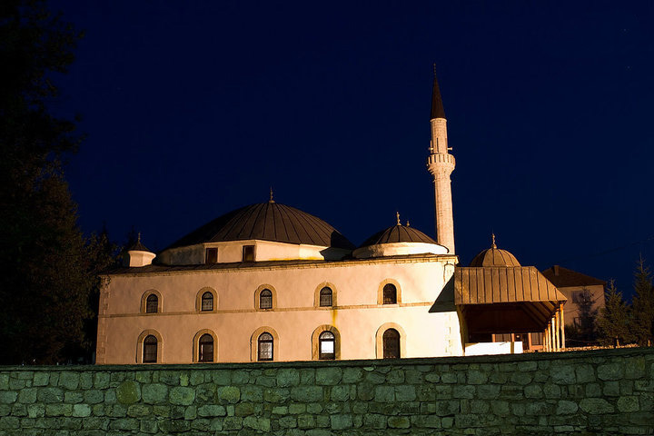 Džamija Sultanija Valida u Sjenici